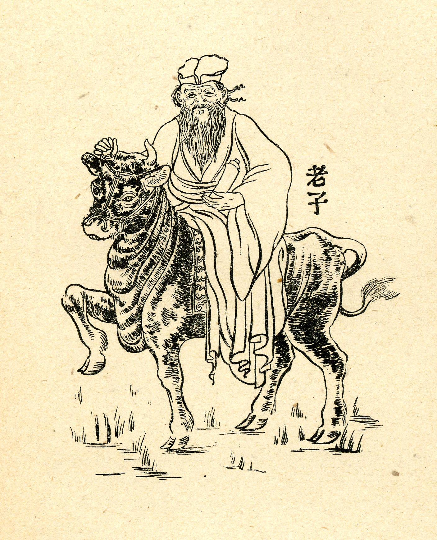 Lao-c'